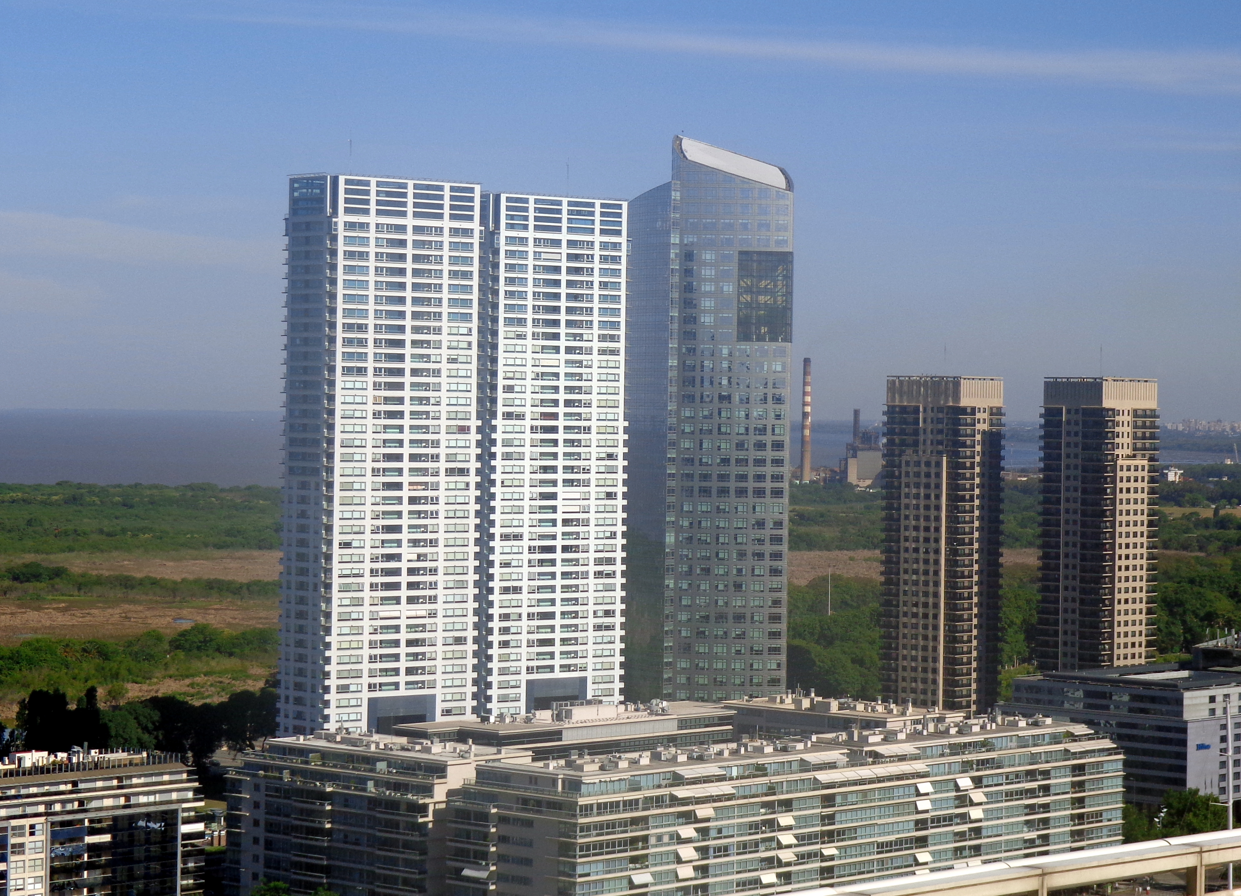 Torres del Yacht (2010) - Torre YPF (2008) - Torres River View (2003). Puerto Madero, Buenos Aires, Argentina.